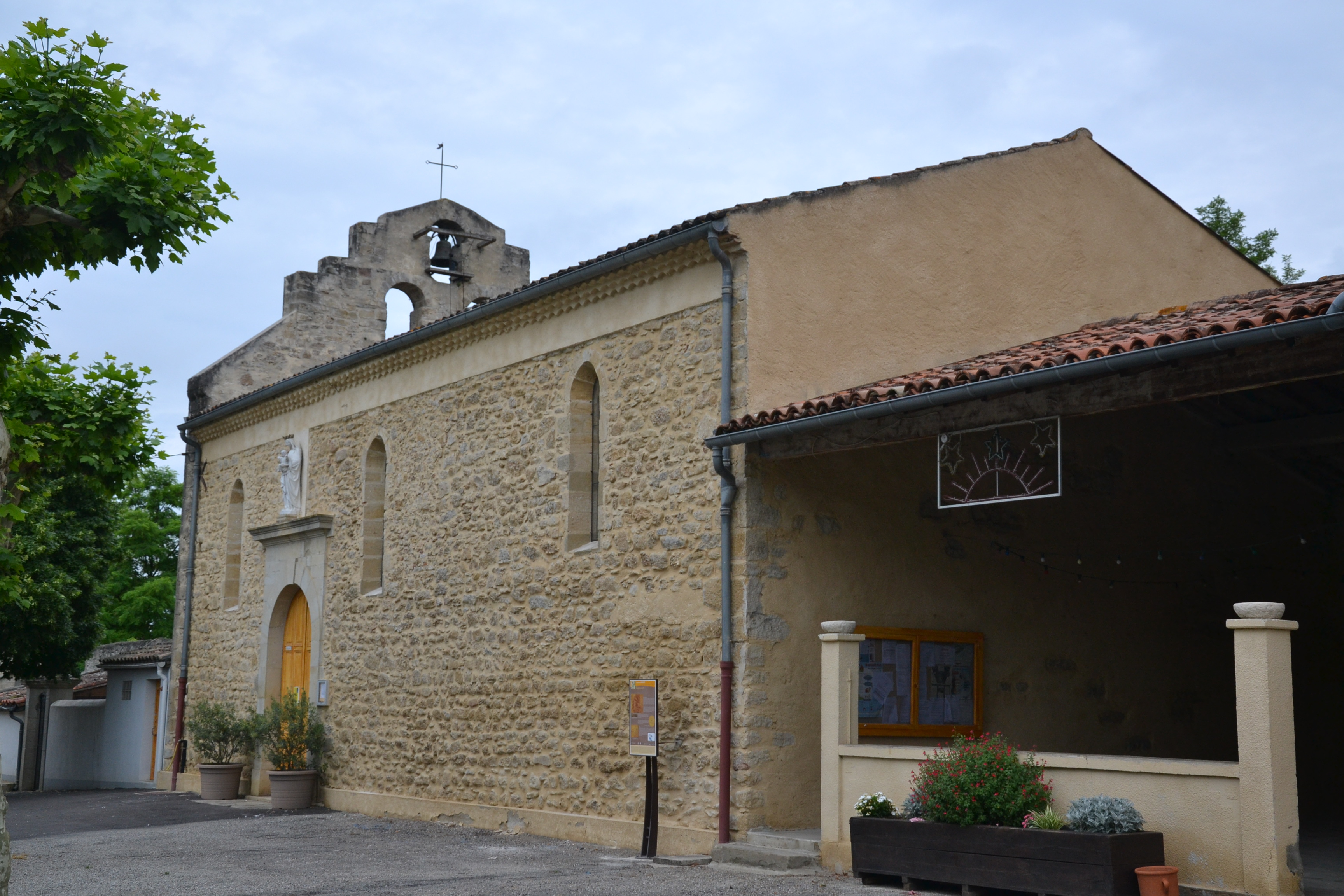 L'église Notre-Dame de Besset (Ariège, France).